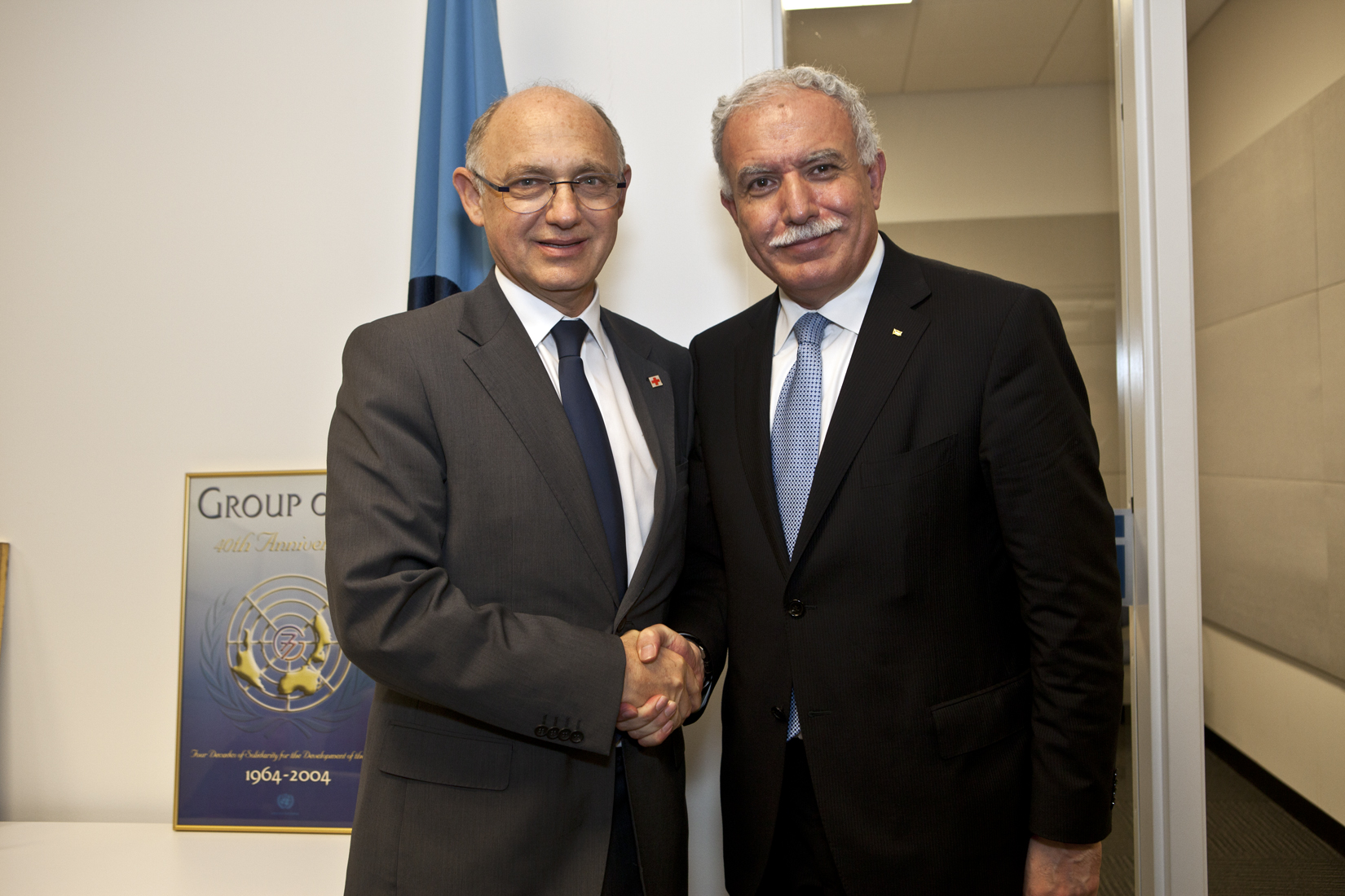 Timerman y Riad Al Malki, su par de Palestina